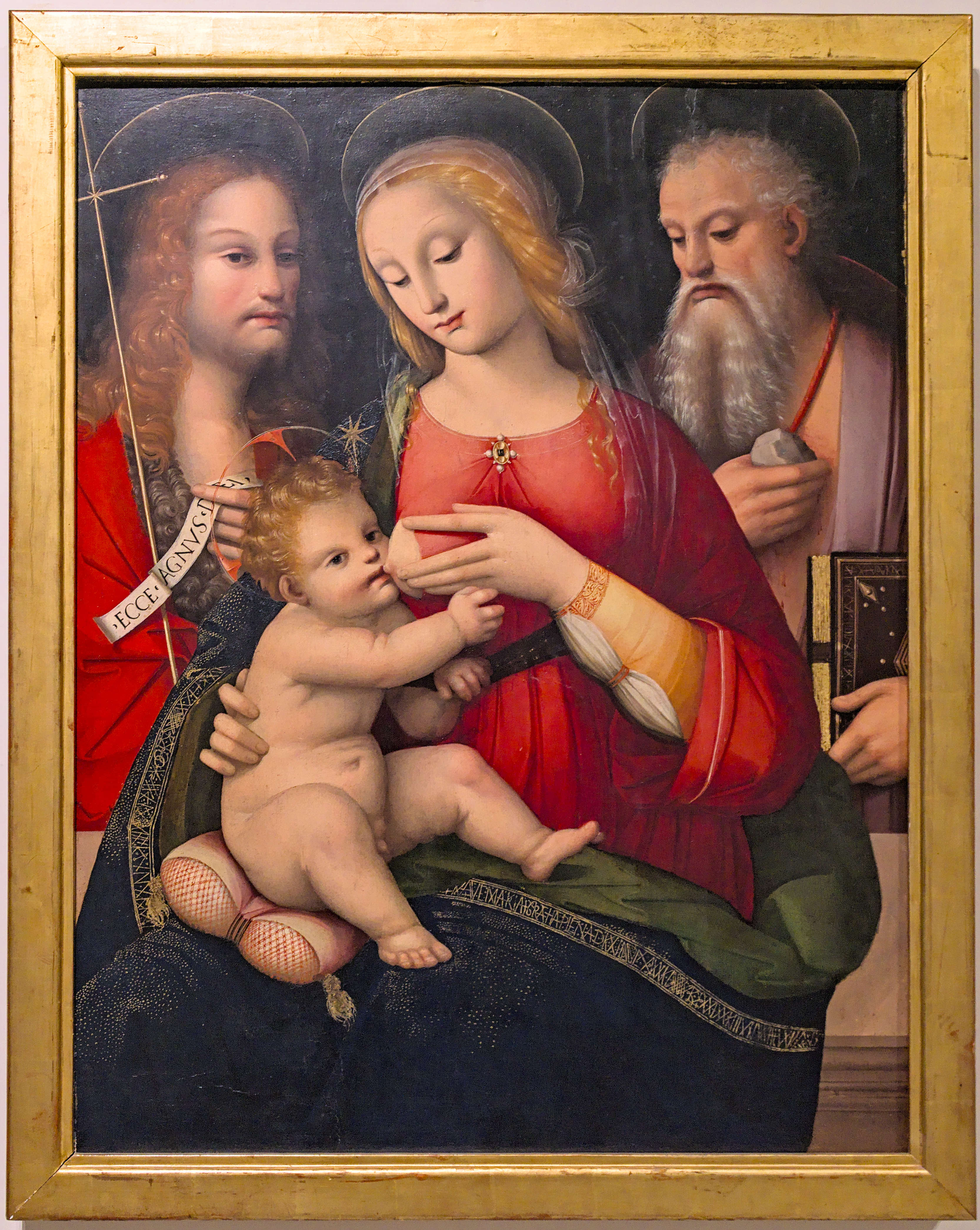 Madonna mit Jesuskind und den Hl. Johannes d. Täufer und Hieronymus; Gemälde des italienischen Malers Andrea Piccinelli (genannt del Brescianino, um 1486 – nach 1525) im Museum für sakrale Kunst (Museo di arte sacra della Val d’Arbia) in der bei Siena gelegenen toskanischen Stadt Buonconvento